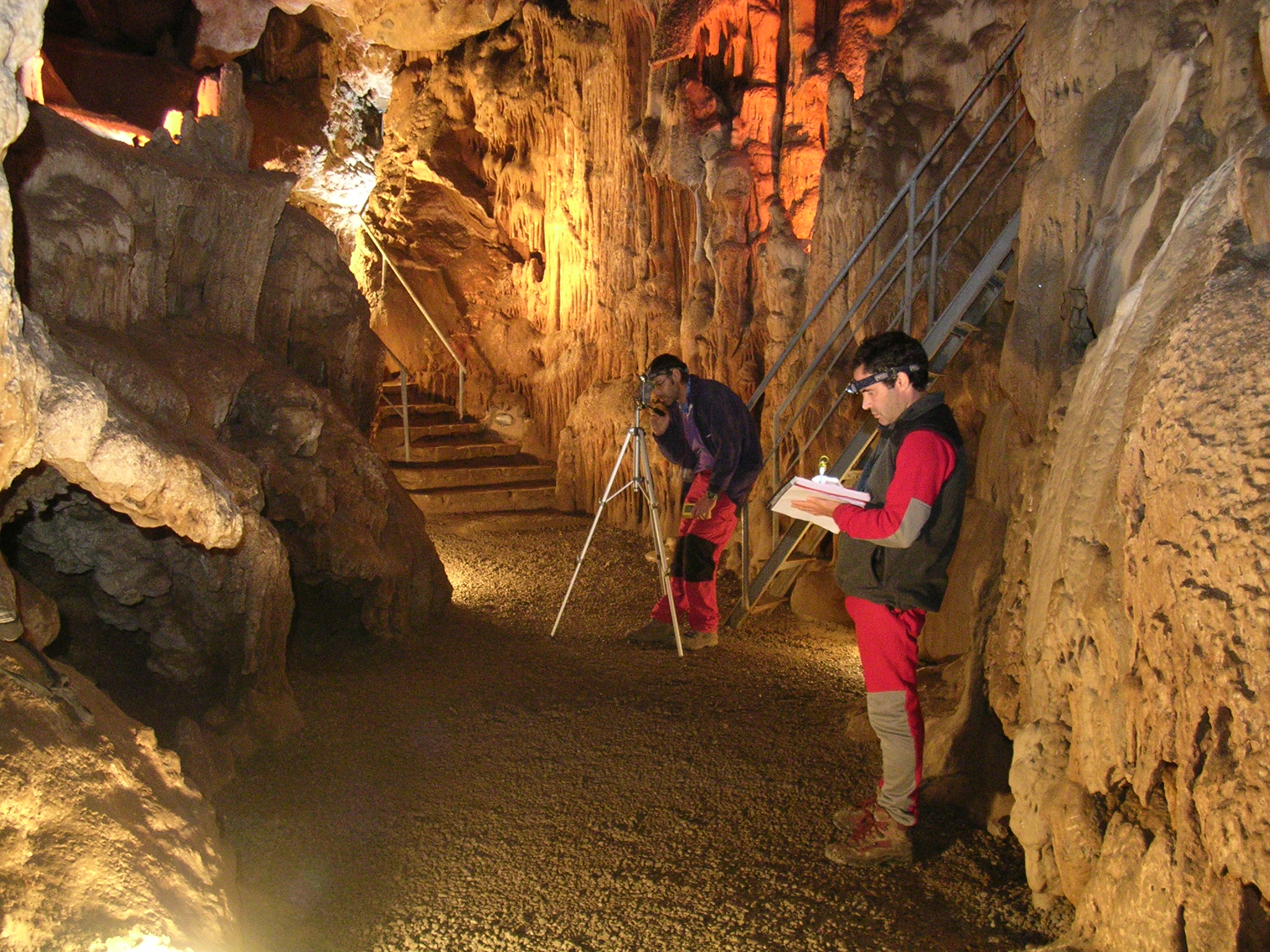 Topografiaren eguneraketa Santimamiñe koban (Kortezubi, Bizkaia).